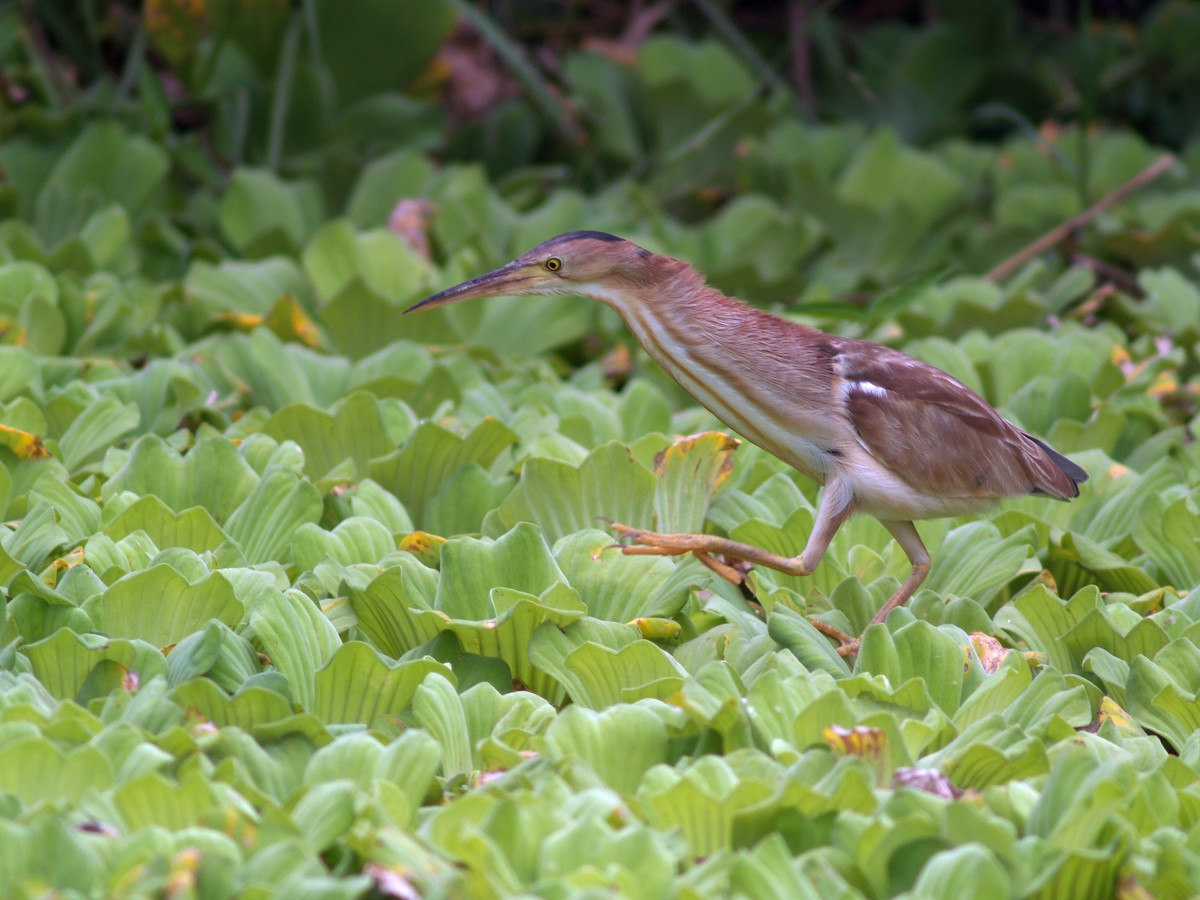 Ixobrychus sinensis 黃小鷺